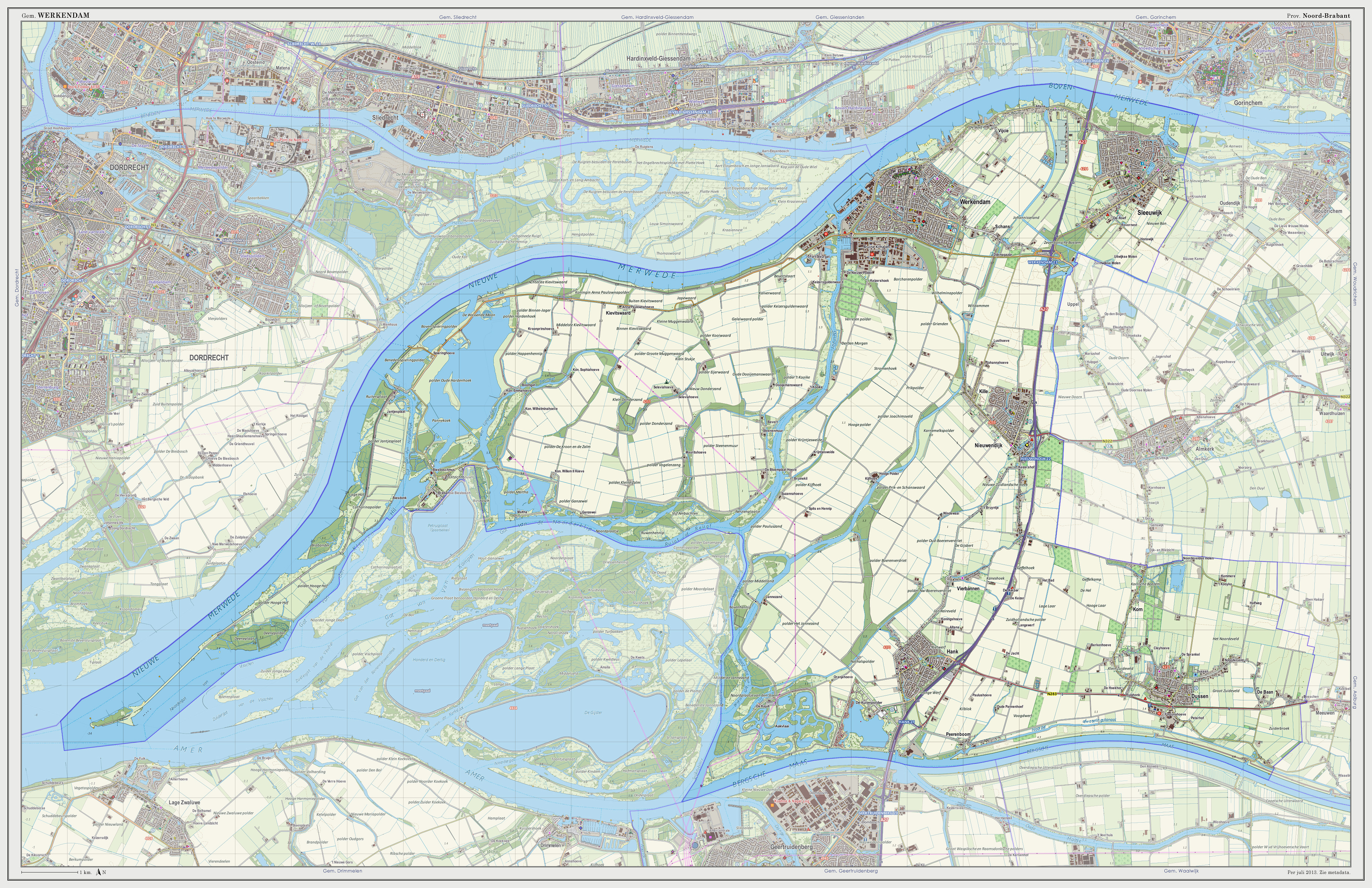 Topografische kaart van gemeente Werkendam (2013). Samengesteld door Jan-Willem van Aalst op basis van de GML open geodata van de BRT/Top10NL (basisregistratie Topografie, Kadaster 2011), vrijgegeven door Kadaster onder de Creative Commons BY licentie. Additionele gegevens uit BAG (8 juli 2013), uit de Open Street Map (9 juli 2013) en uit de Risicokaart. Peildatum kaartbeeld: 9 juli 2013. Zie ook Gemeentenatlas.nl Samenstelling en kleurenschema: Jan-Willem van Aalst, met QuantumGIS en Photoshop. Zie ook de Legenda.